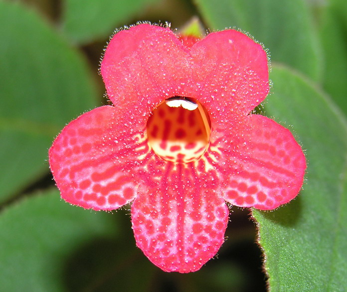 Kolerija (Kohleria sp.). Šeima. Gesneriniai (Gesneriaceae